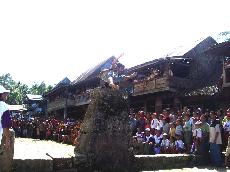 "Fahombo" (Lompat Batu), Nias, Indonesia